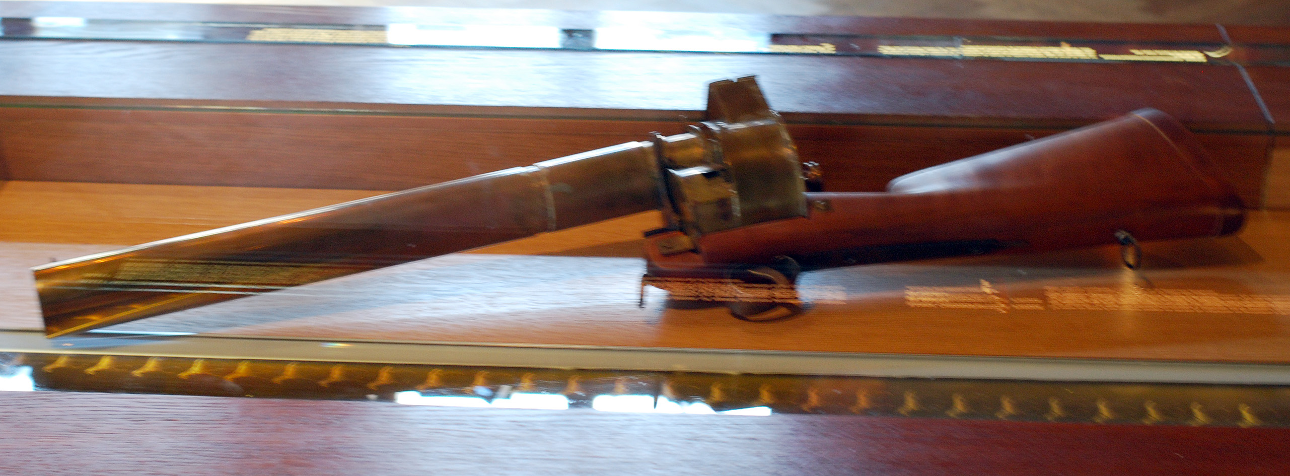 Nachbau von Mareys chronofotografischer Flinte („Fotografisches Gewehr“) im Musée Lumière Lyon